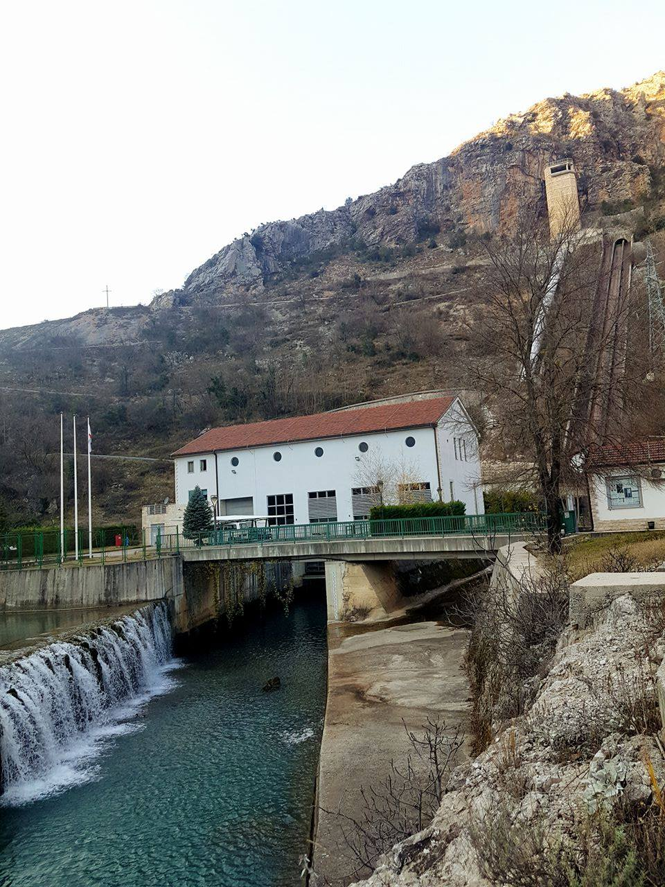 Hidroelektrana Peć Mlini, Grude, Bosna i Hercegovina